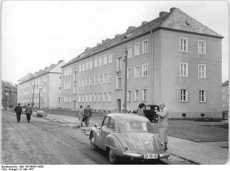 Hoyerswerda, Wohnblocks Zentralbild Krueger voi-Ho. 9.5.1957 Kombinat "Schwarze Pumpe" - ein großer Bauplatz Noch im Jahre 1959 500000 Tonnen Briketts, ist die Verpflichtung der Angehörigen im Kombinat "Schwarze Pumpe". An der Fertigstellung des Kraftwerkes West im Kombinat wird zur Zeit gearbeitet. Der erste Kühlturm steht. Er ist 55 Mater hoch und wurde 20 Tage vor dem Staatstermin am 11.4.57 übergeben. Die drei 120 Meter hohen Schornsteine des Kraftwerkes werden nach neuen Erkenntnissen gebaut. Einer davon ist fertig. Die Kollegen des Spezialbaus für Kühltürme und Schornsteine, Leipzig, haben sich verpflichtet, ihren Halbjahrplan bis zum 15.6.57 zu erfüllen. U: B: z.: Einige der ersten fertiggestellten Wohnungsblöcke in Hoyerswerda. Information added by Wikimedia users.